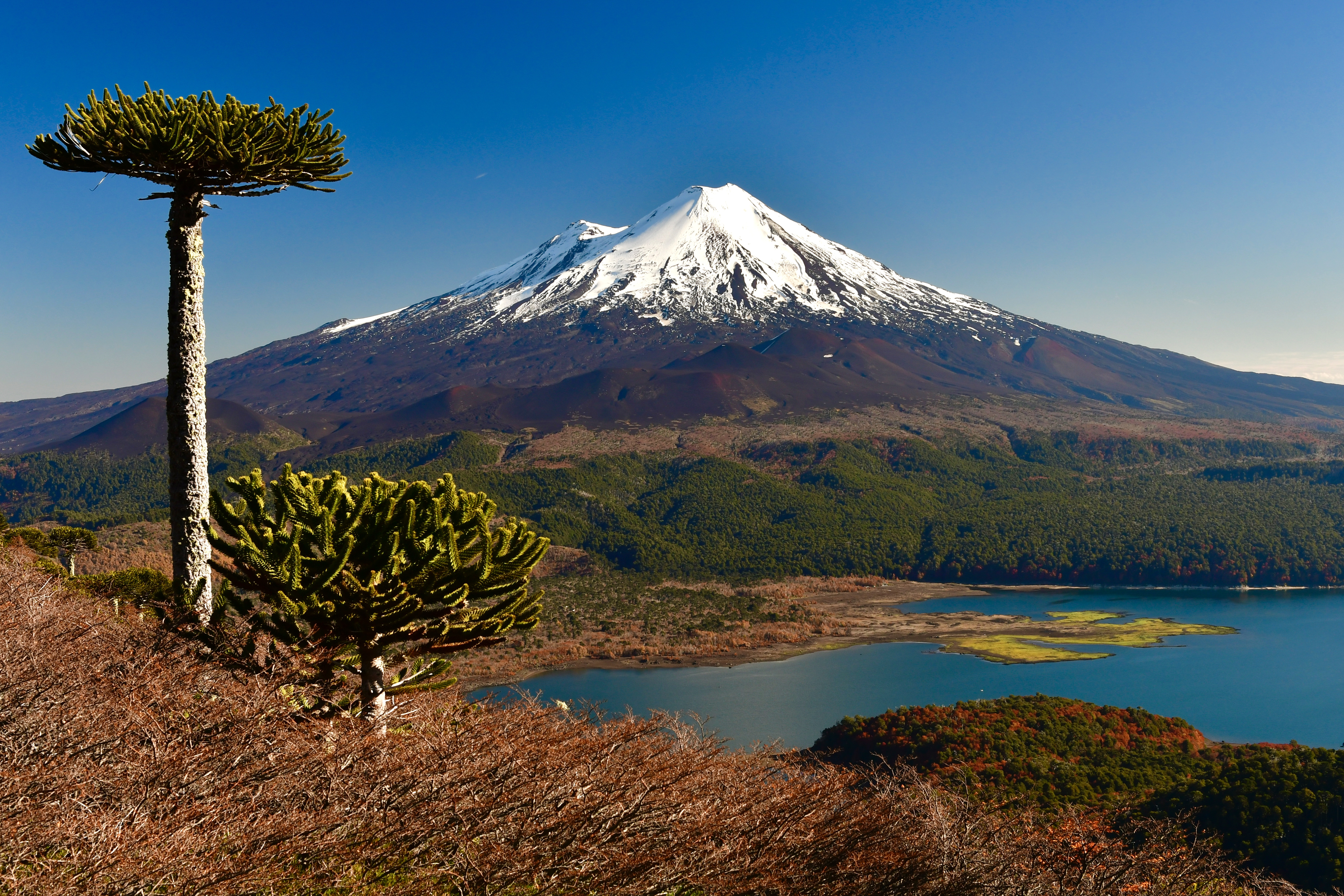 Toma desde Sierra Nevada, en el Otoño del Parque Nacional Conguillío